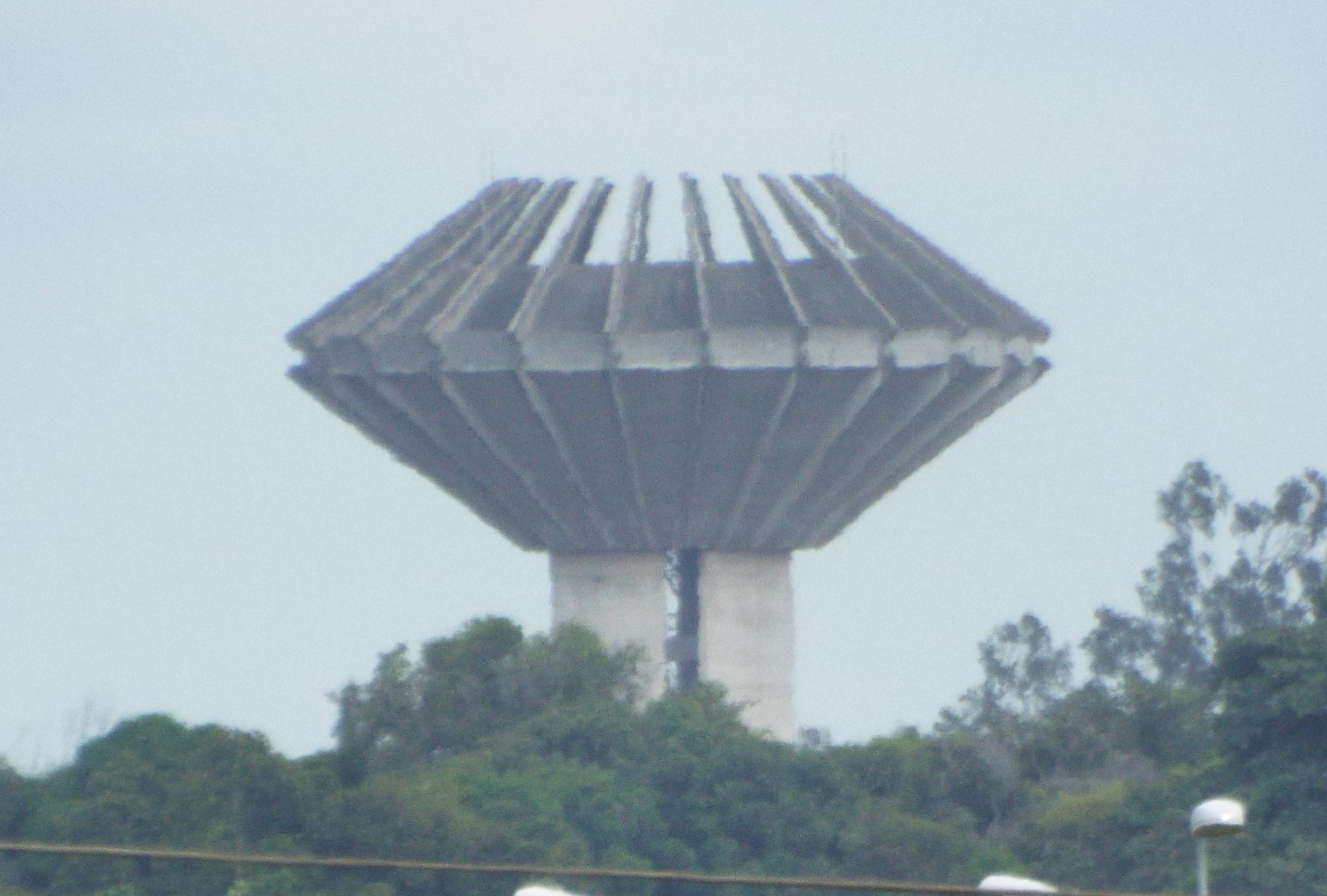 Caixa d'agua do Tomba.